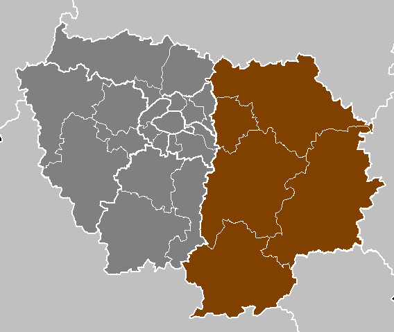 Maps of arrondissements and cantons of France: Département de Seine-et-Marne.PNG (Région Île-de-France)